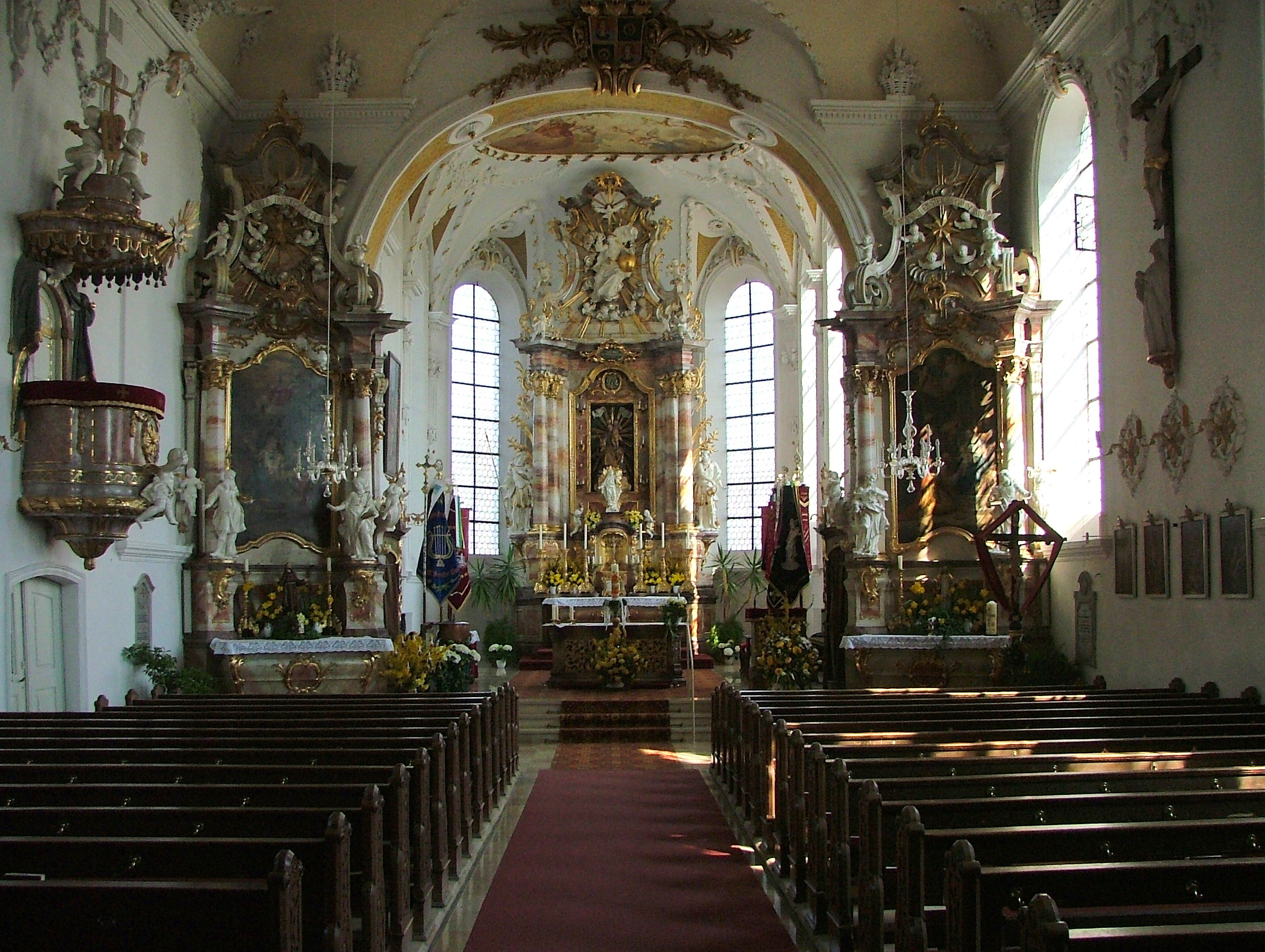 Pfarrkirche